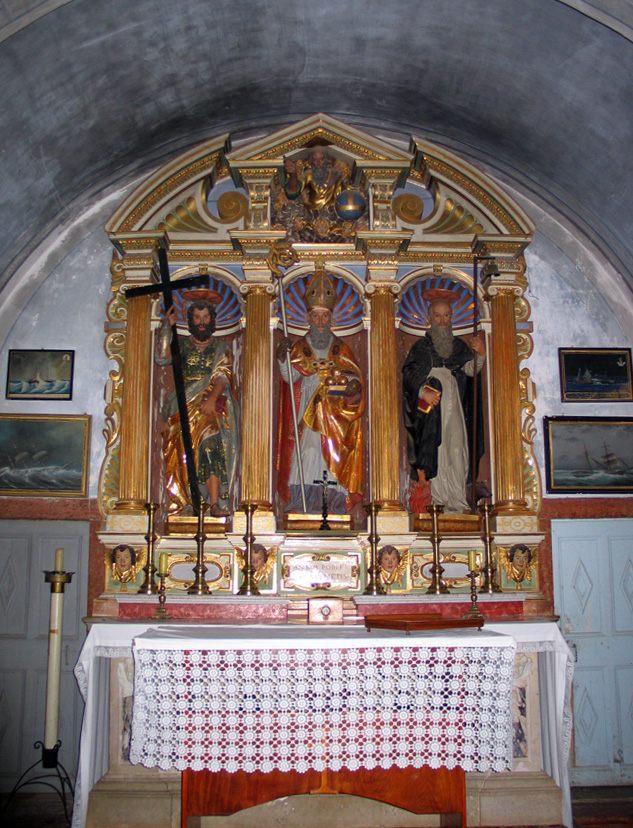 Glavni oltar crkve sv. Nikole u Starom Gradu na Hvaru